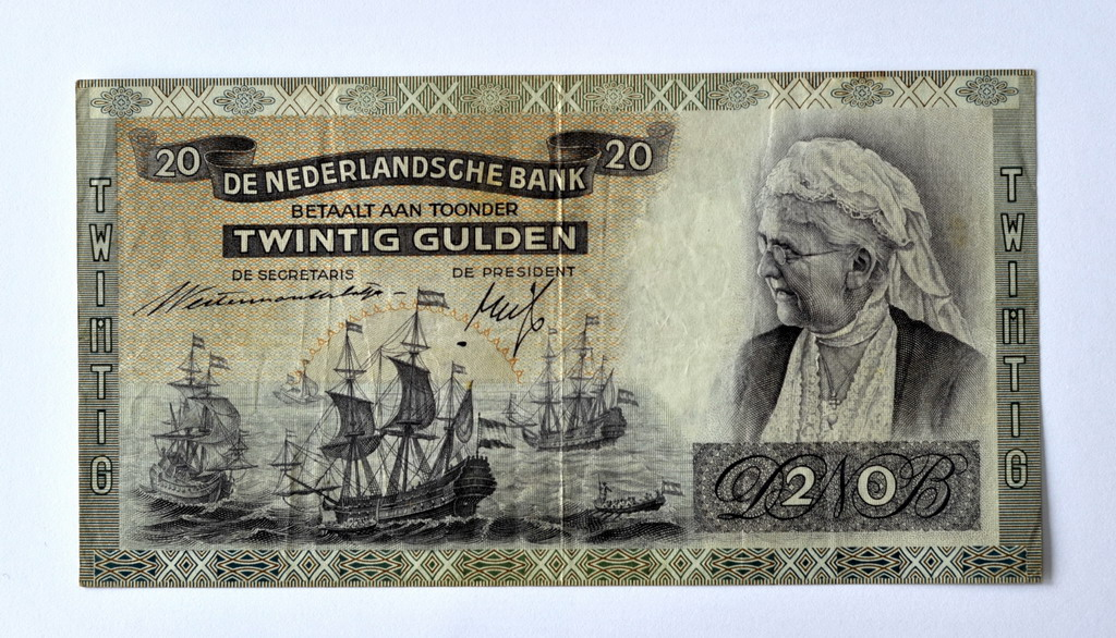 Beeltenis van Koningin Emma